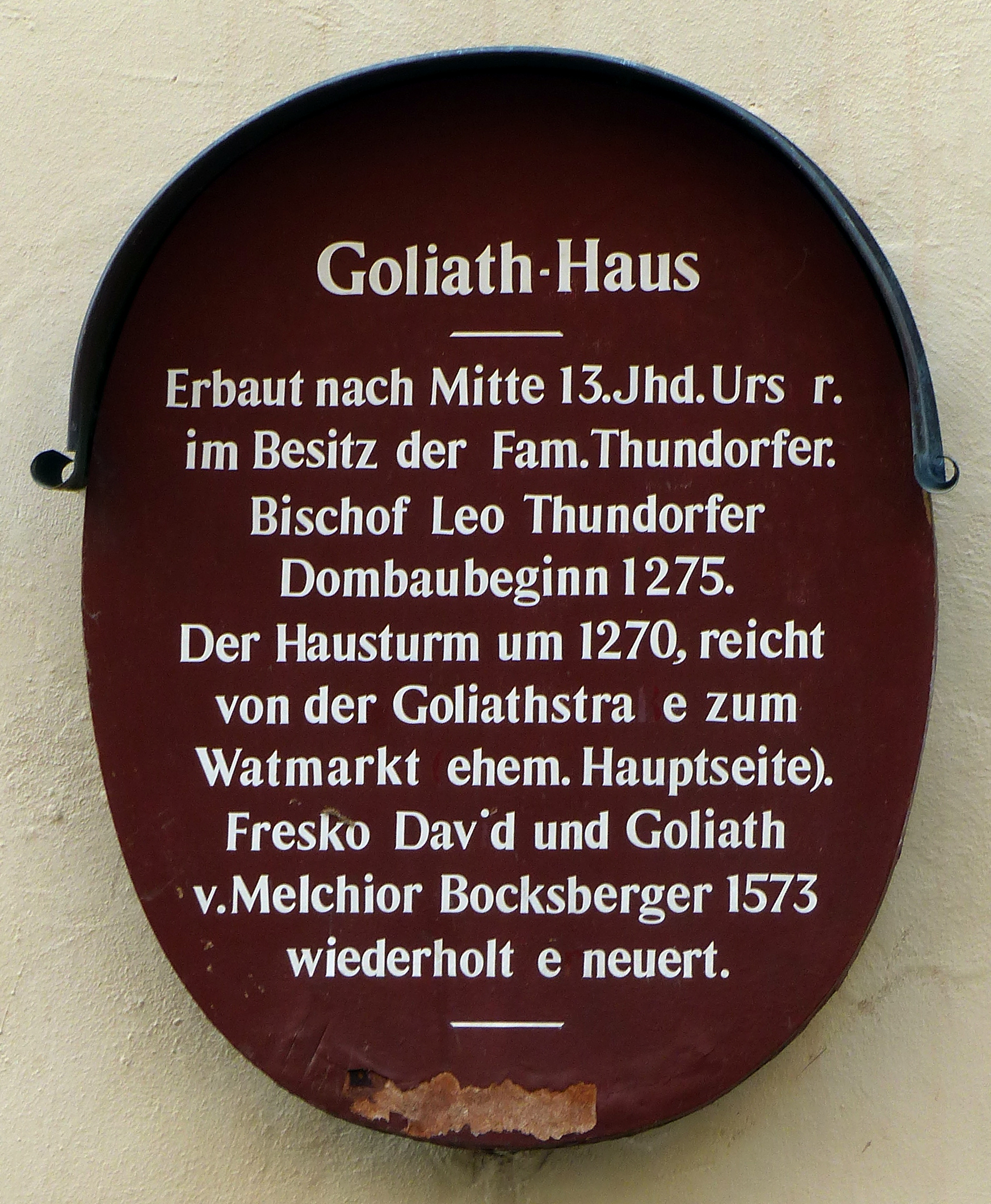 Infotafel, Goliath-Haus, Goliathstraße 4, RegensburgThis is a photograph of an architectural monument.